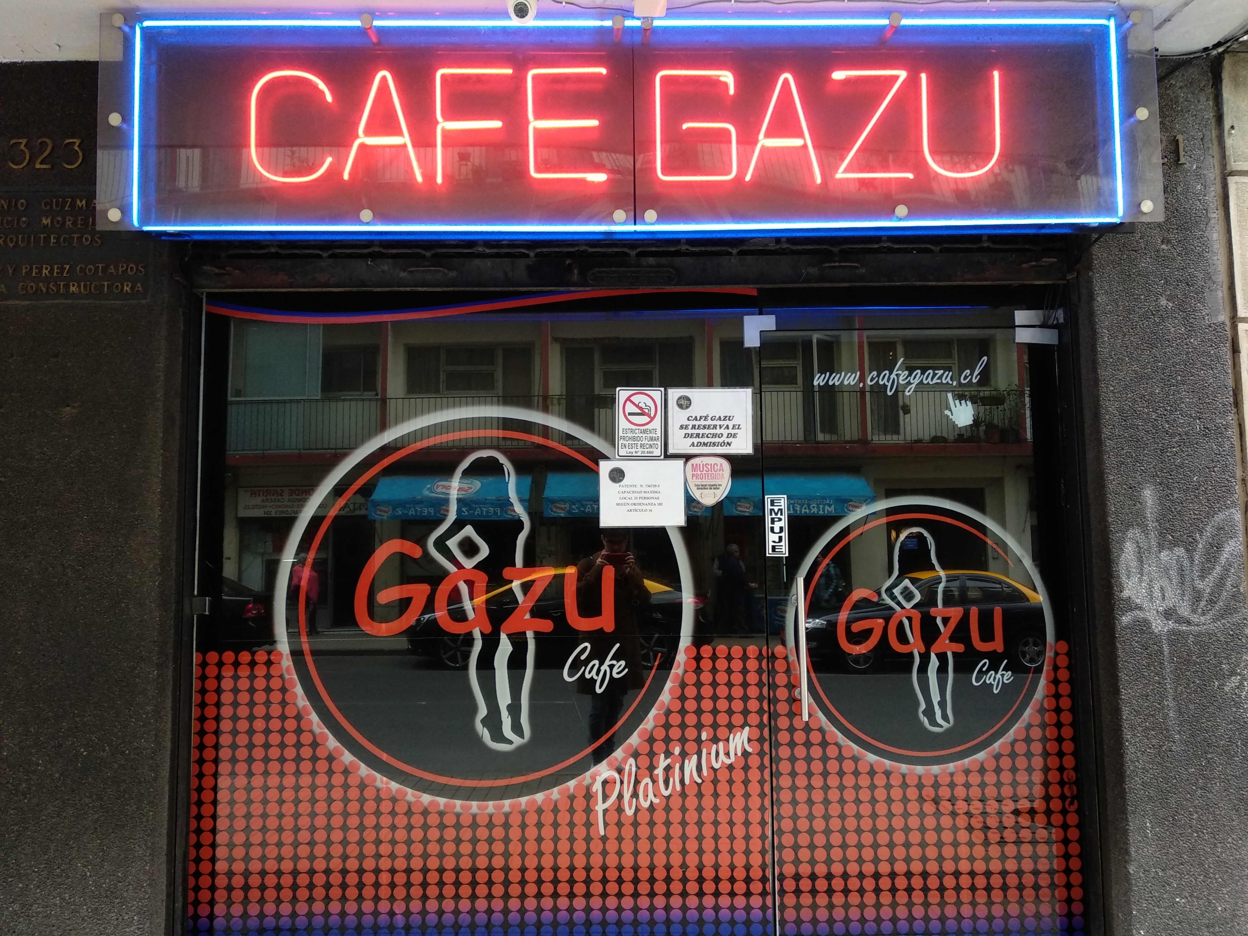 Fachada del Café Gazú, un café con piernas ubicado en Santiago de Chile.